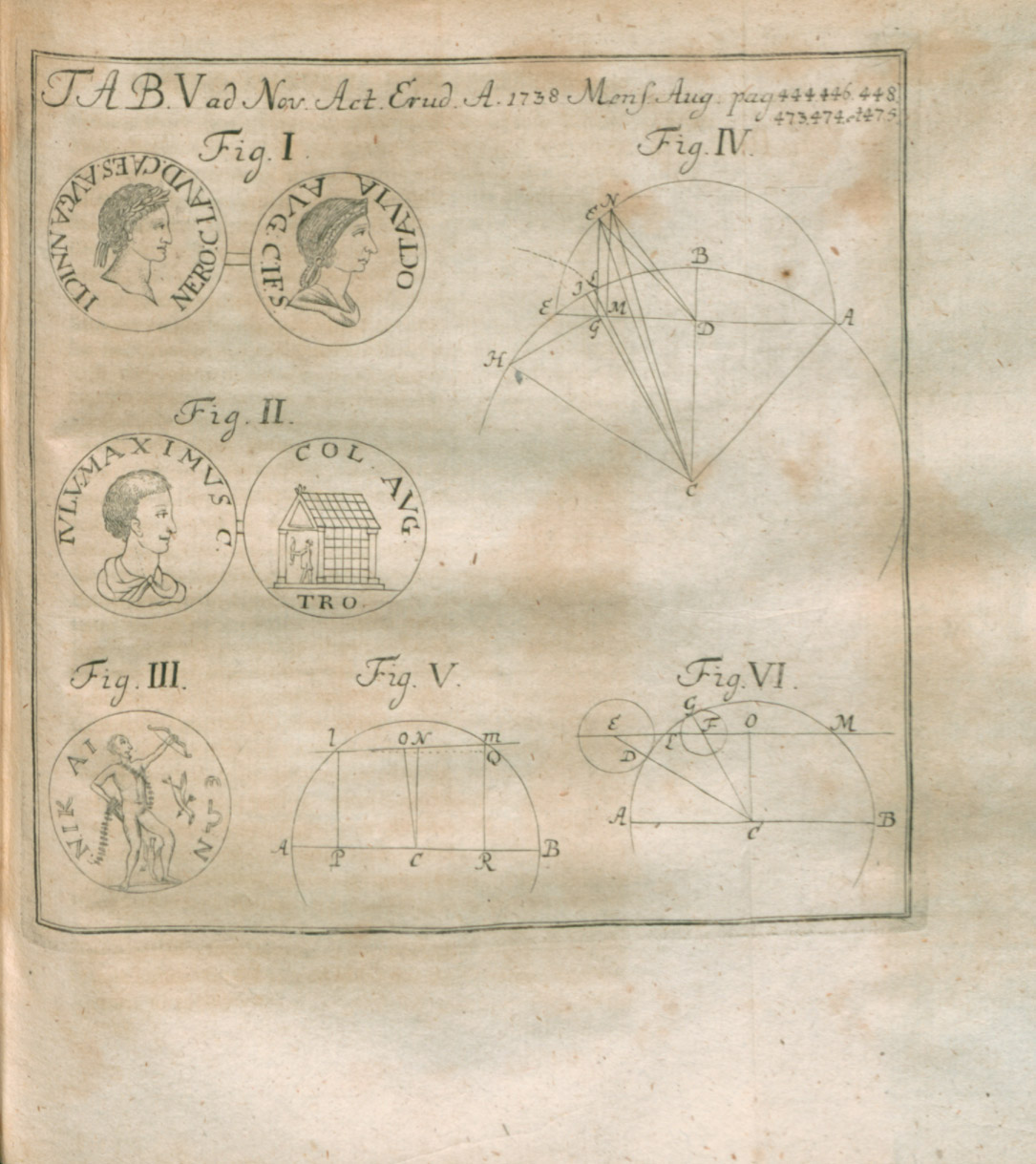 Illustration